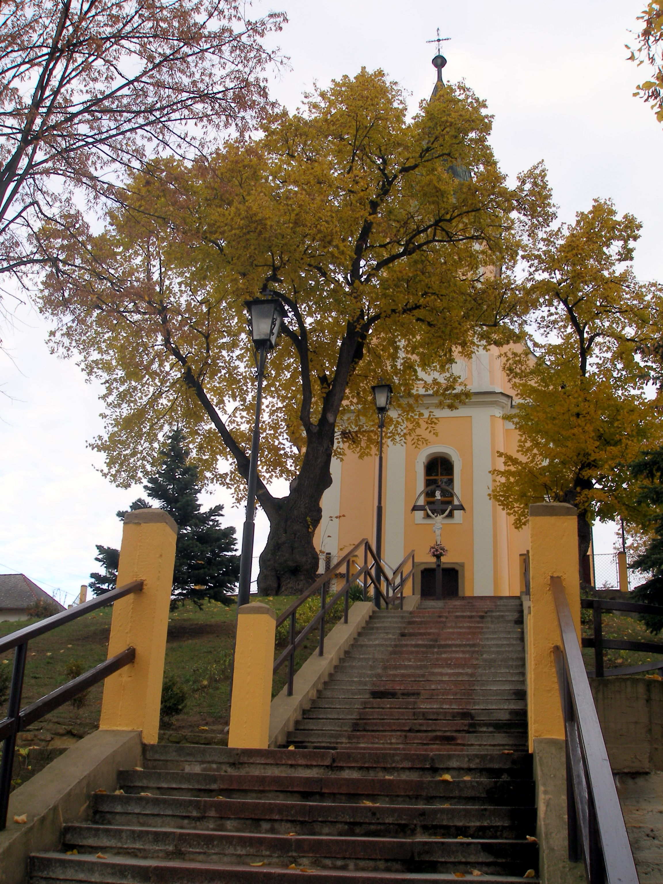 Obec Šarišské Michaľany, okres Sabinov, región Šariš This medium shows the protected monument with the number 708-11099/0 (other) in the Slovak Republic.